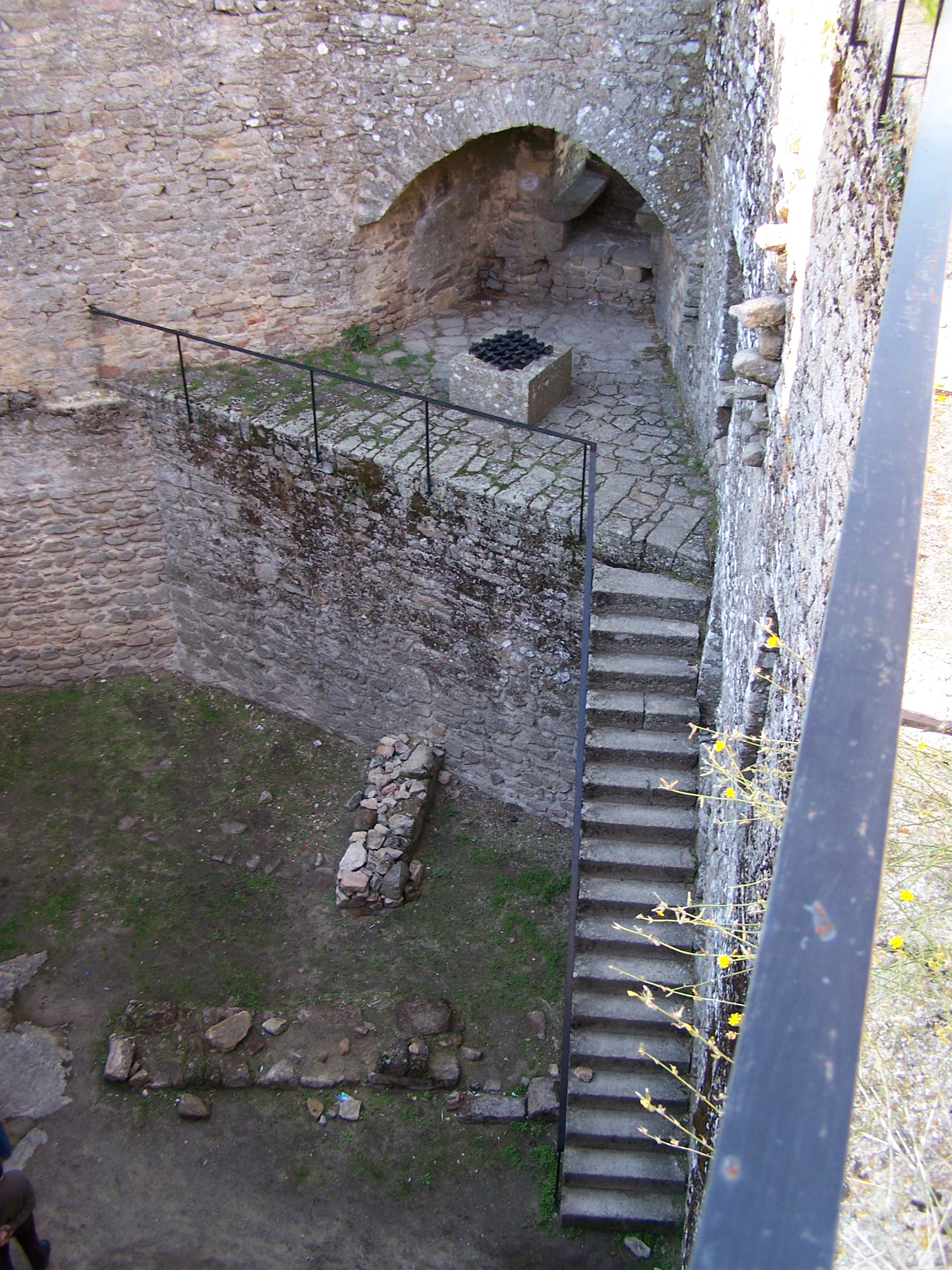 Castelo de Penedono, Penedono, Portugal